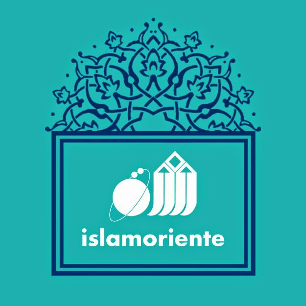 Logotipo de la fundación de Islam Oriente